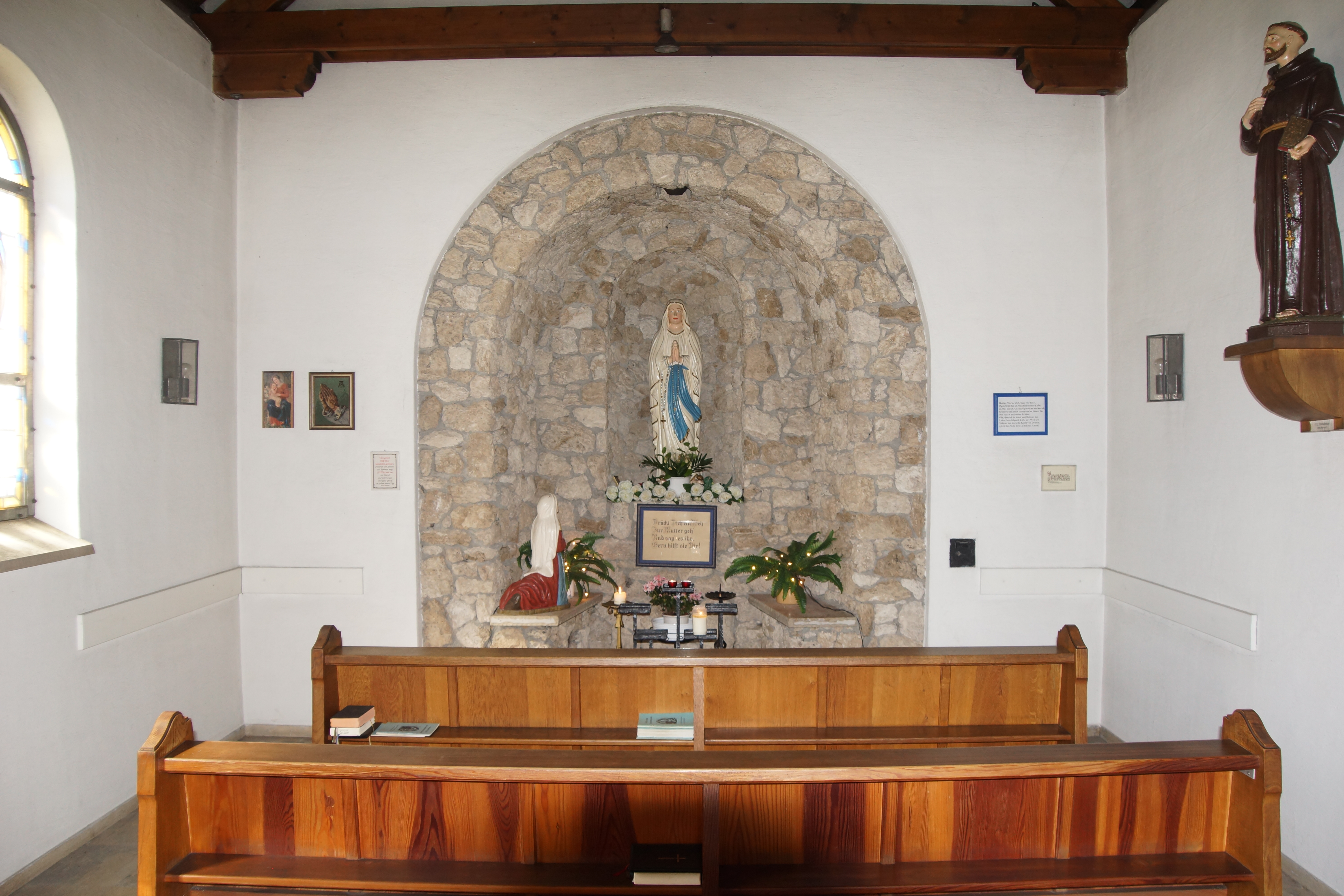 St. Jakob - Schirmitz